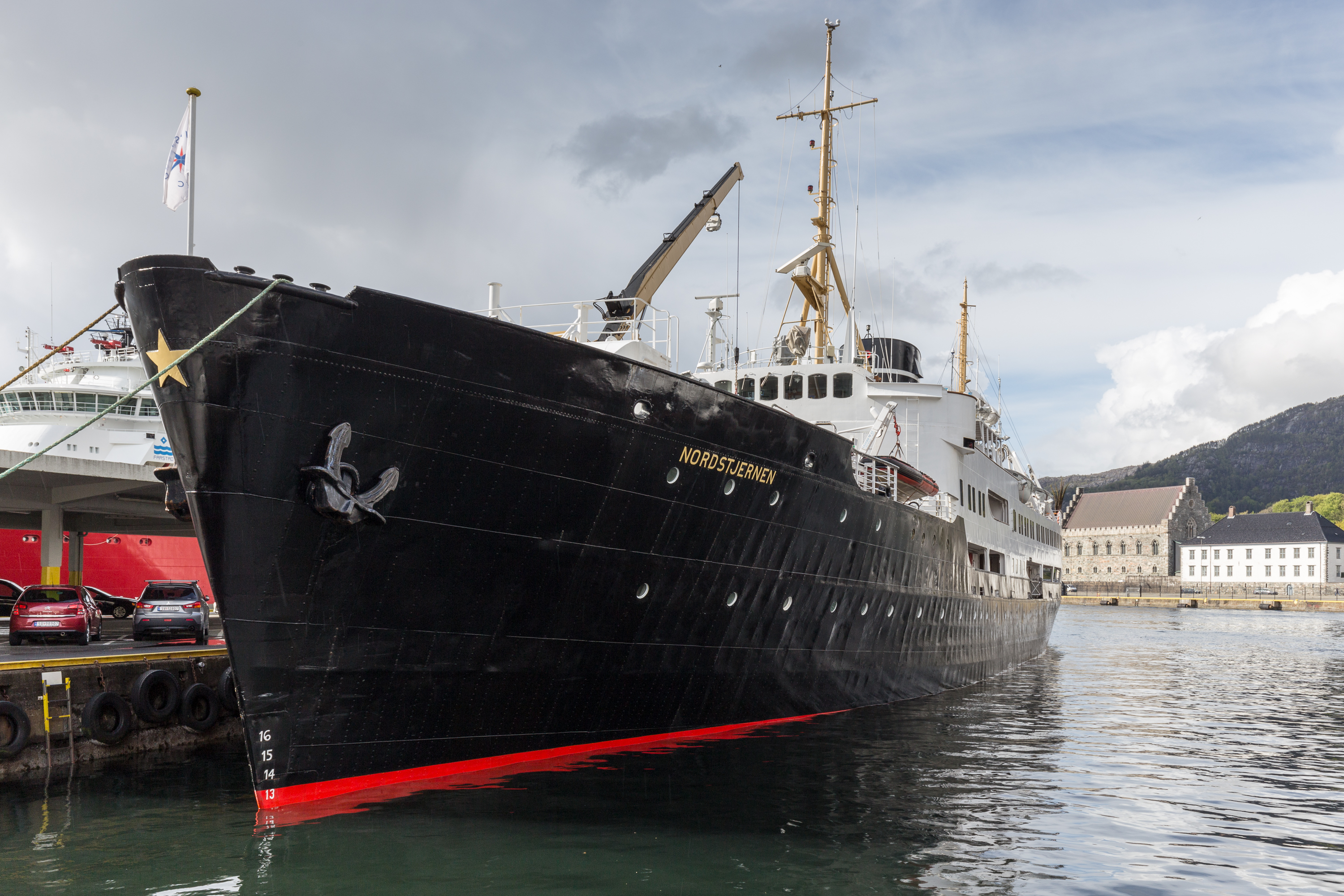 MS Nordstjernen vertäut am Holbergskaien in Bergen